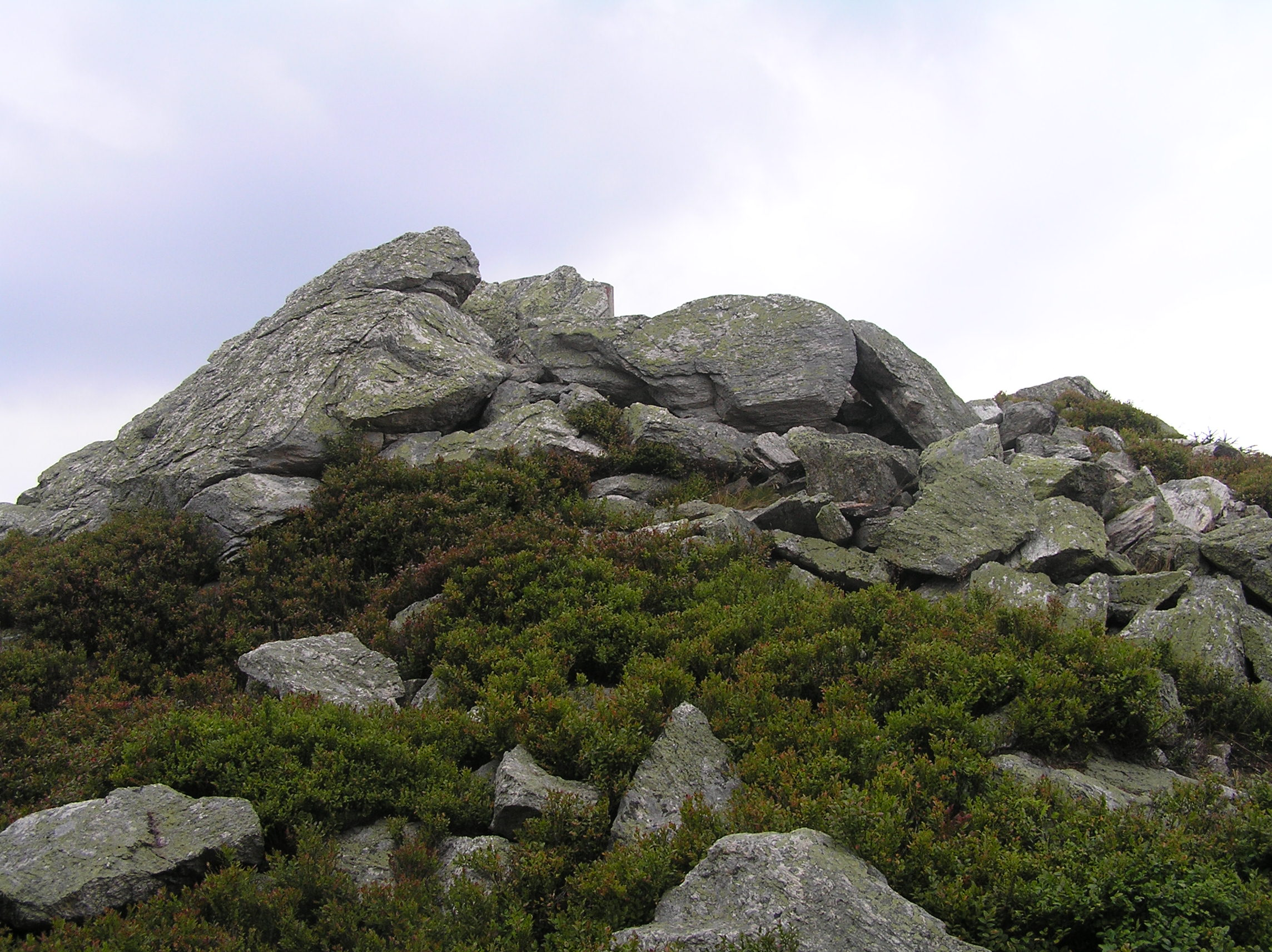 Stroma (1167 m), the Králický Sněžník Mountains, Poland